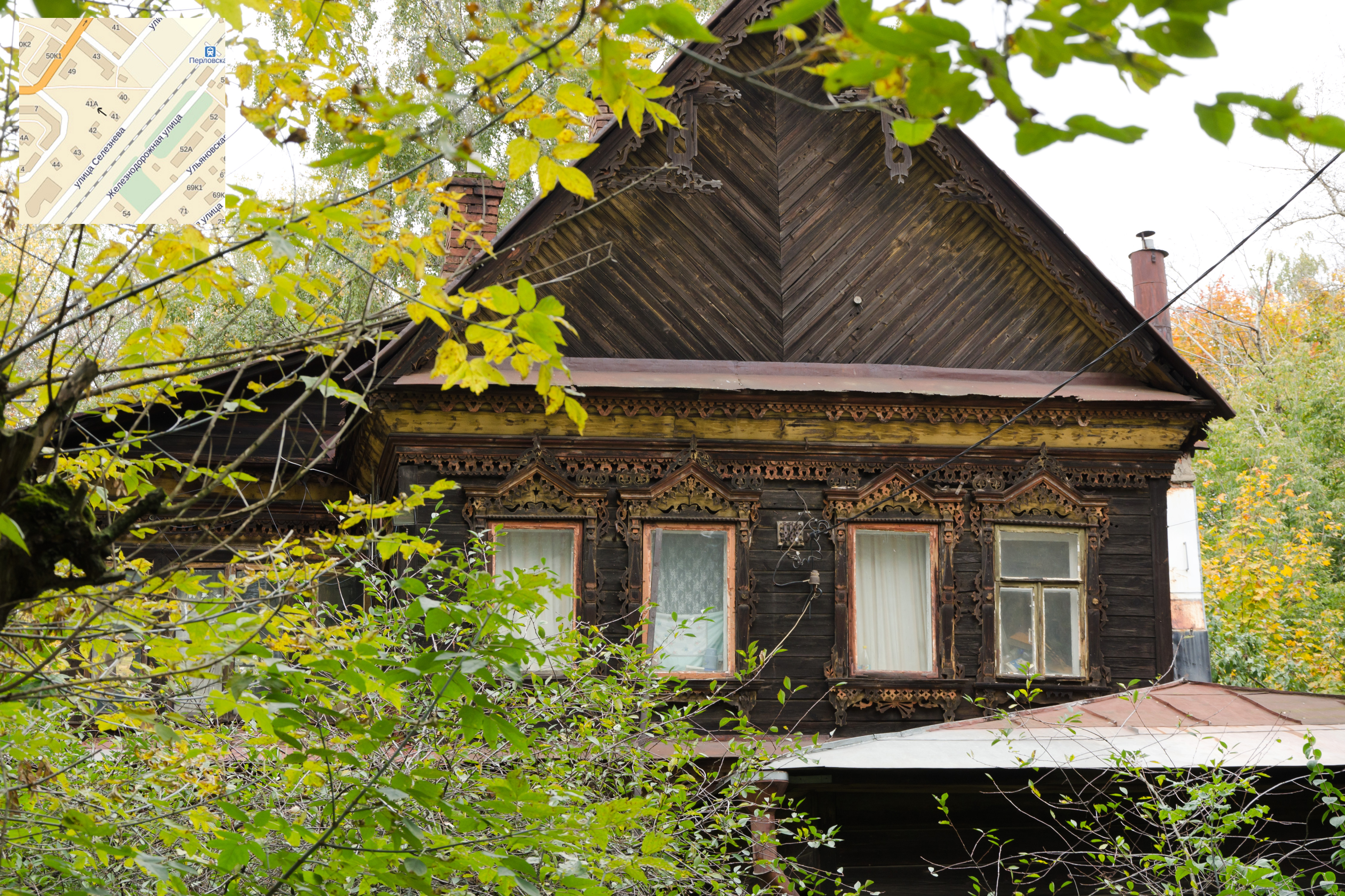 Дача Буяновых (деревянная) (Москва и Московская область, Мытищи, Селезнева улица, 41а) Дом окружен со всех сторон высоким забором (около 2 метров), калитка закрыта. Очень много растительности, деревьев. Скорее всего является жилым домом, на первом этаже дома даже установлены пластиковые окна.